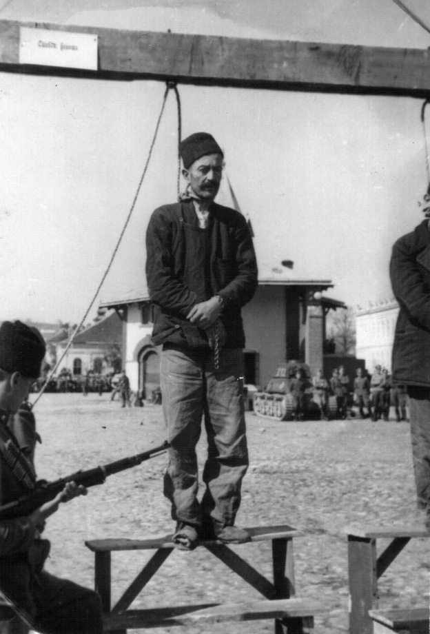 Srpskohrvatski / српскохрватски: Stevan Borota, komandir čete Posavsko-tamnavskog partizanskog odreda, neposredno pred pogubljenje, Valjevo, 27. mart 1942.